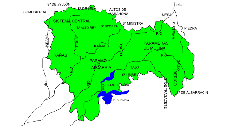 Mapa provincia de Guadalajara